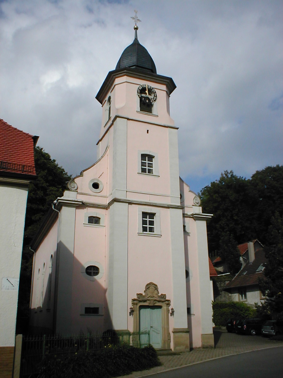 Barocke evangelische Kirche in Wollenberg, erbaut 1768